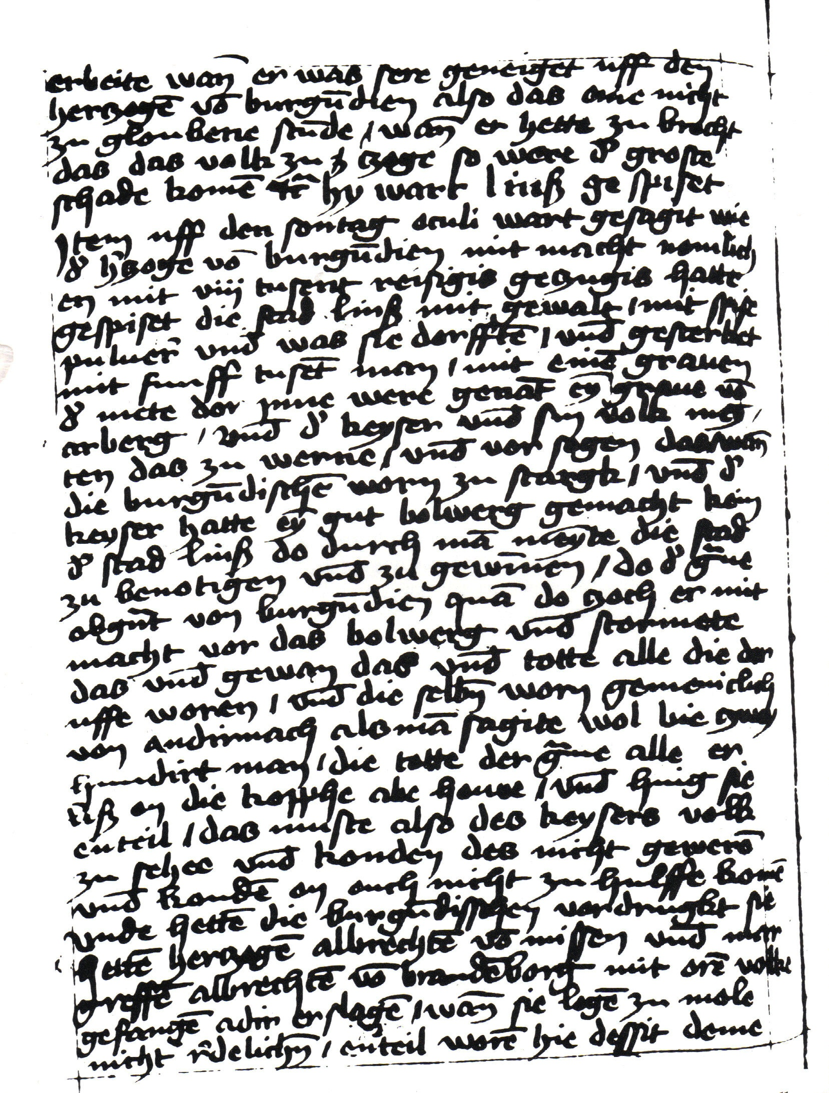 Autograph von Konrad Stolles Chronik, ULB Jena, Ms. Sag. q. 3, Bl. 194v